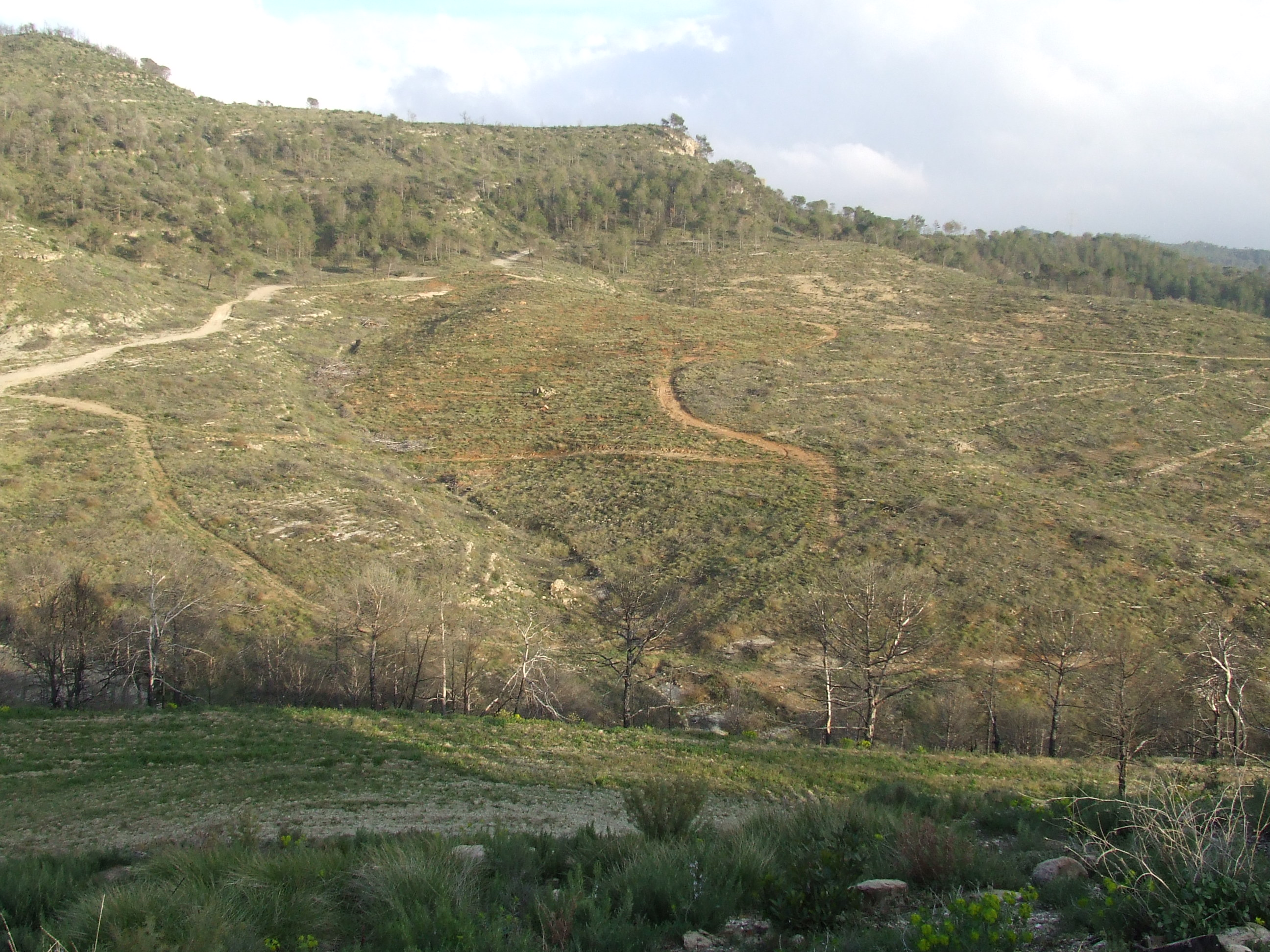 Els Pins del Julià (Monistrol de Calders, Moianès)